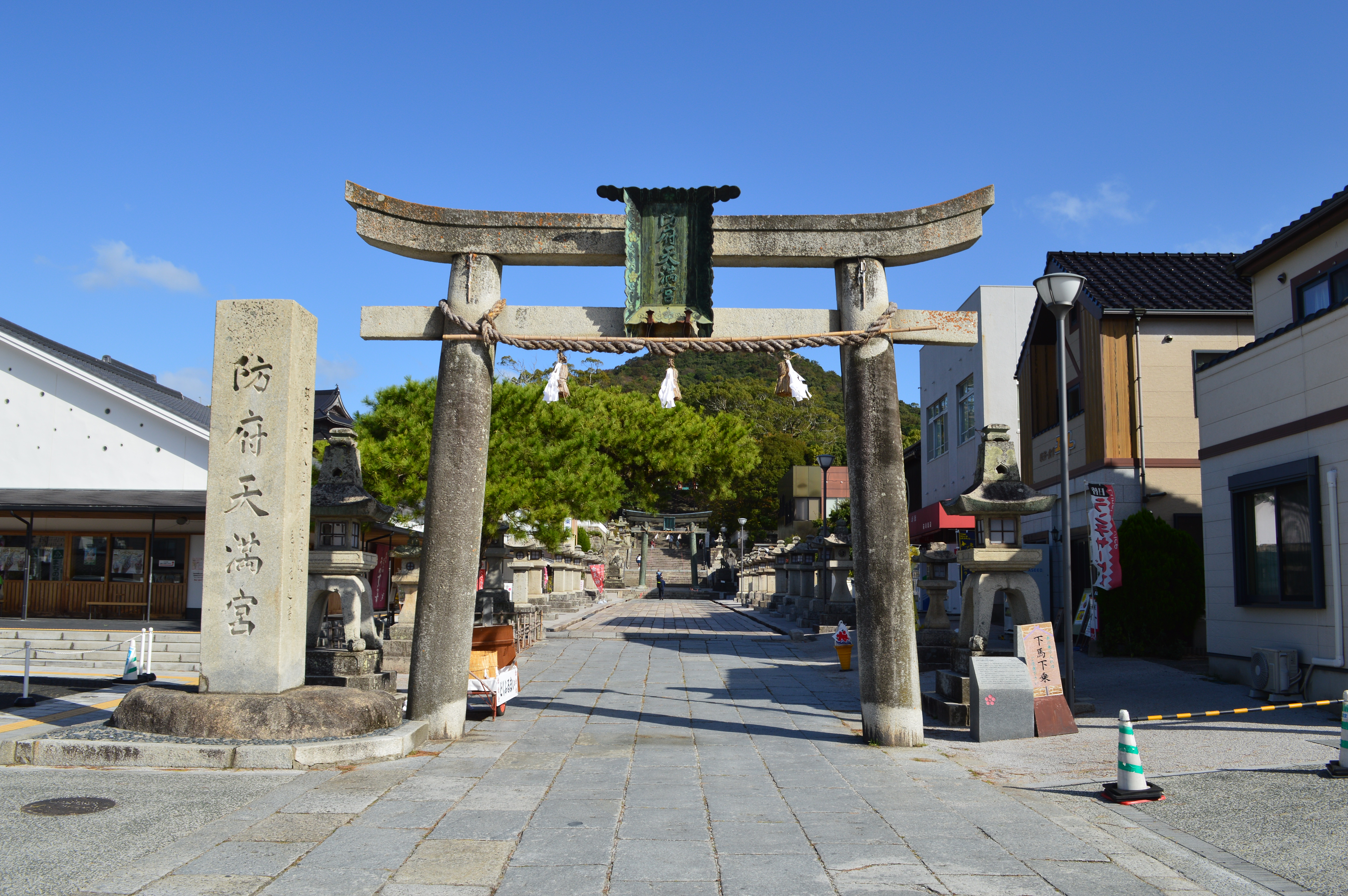 防府天満宮 大鳥居